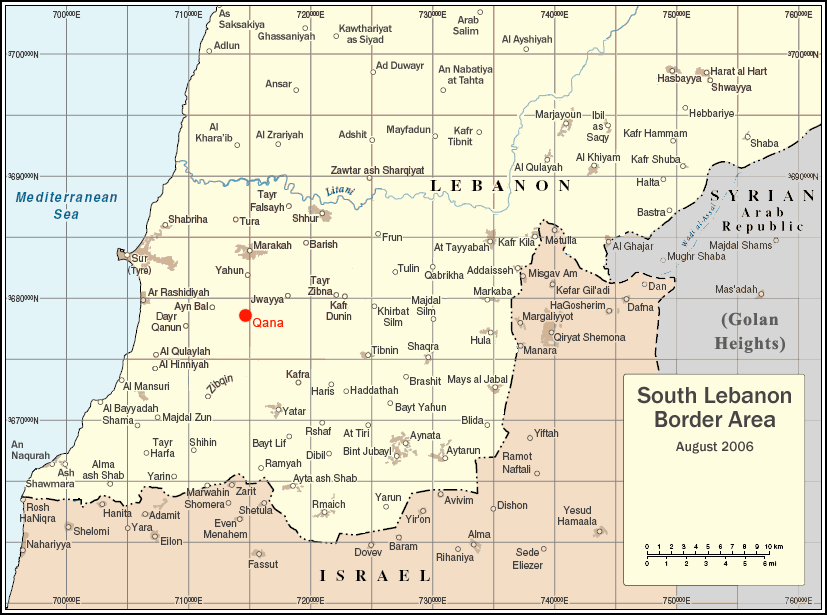 Locator map for Qana, Lebanon